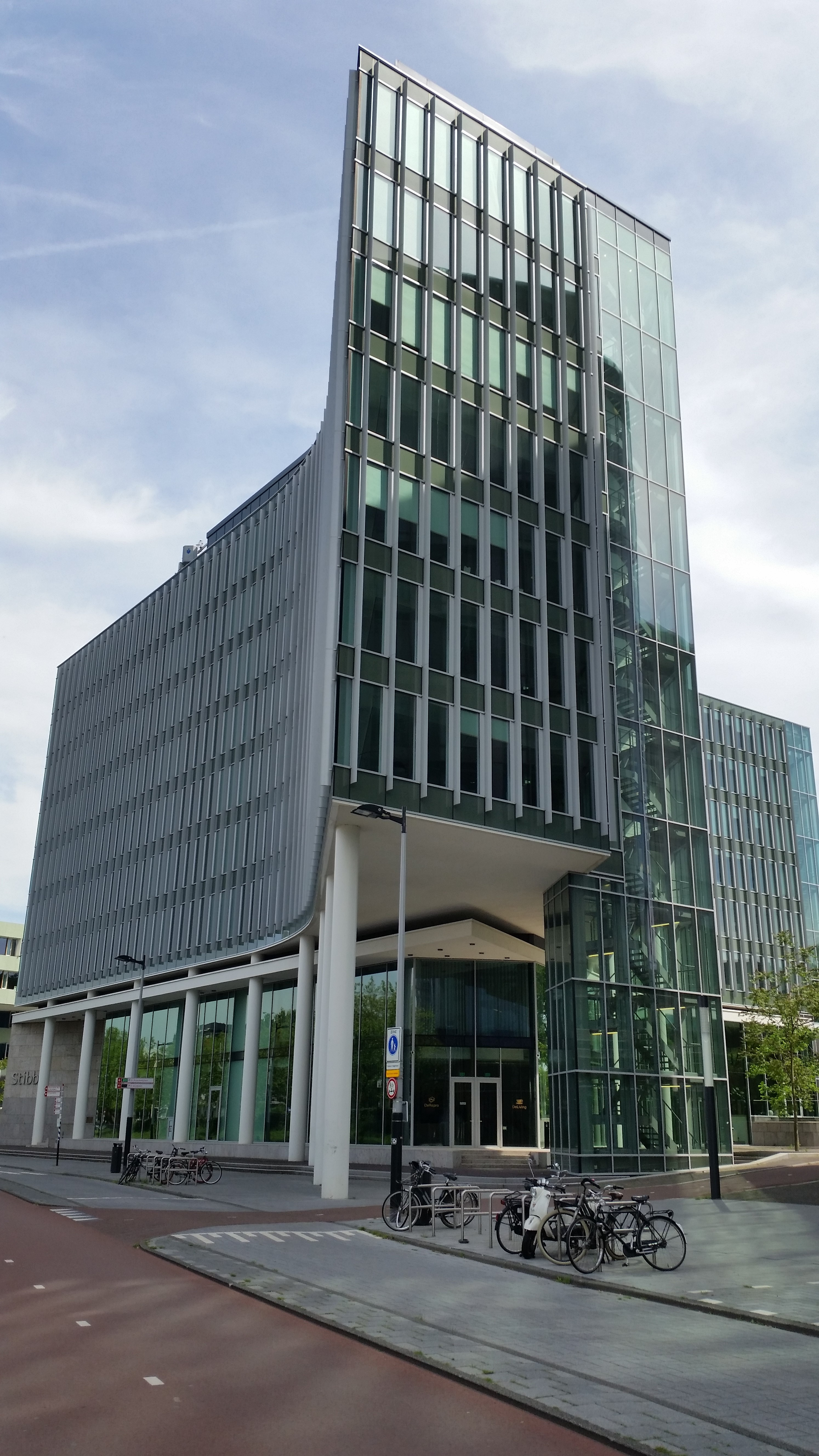 Stibbe, Beethovenplein 10, Amsterdam-Zuid